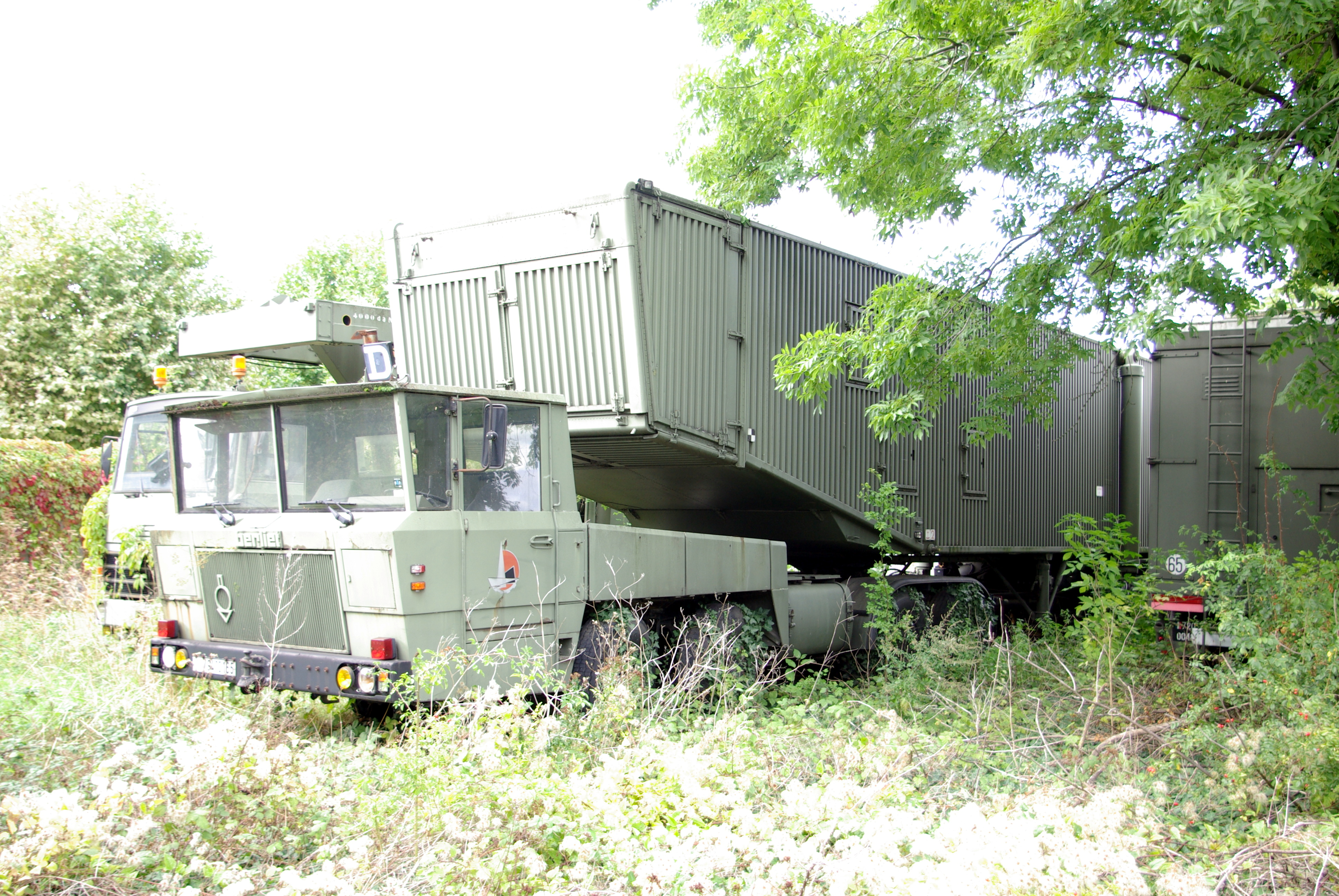 Véhicule Transporteur Érecteur avec tracteur Berliet TF 8x4 pour missile S3 conservé en extérieur dans les réserves du musée de l'Air et de l'Espace.